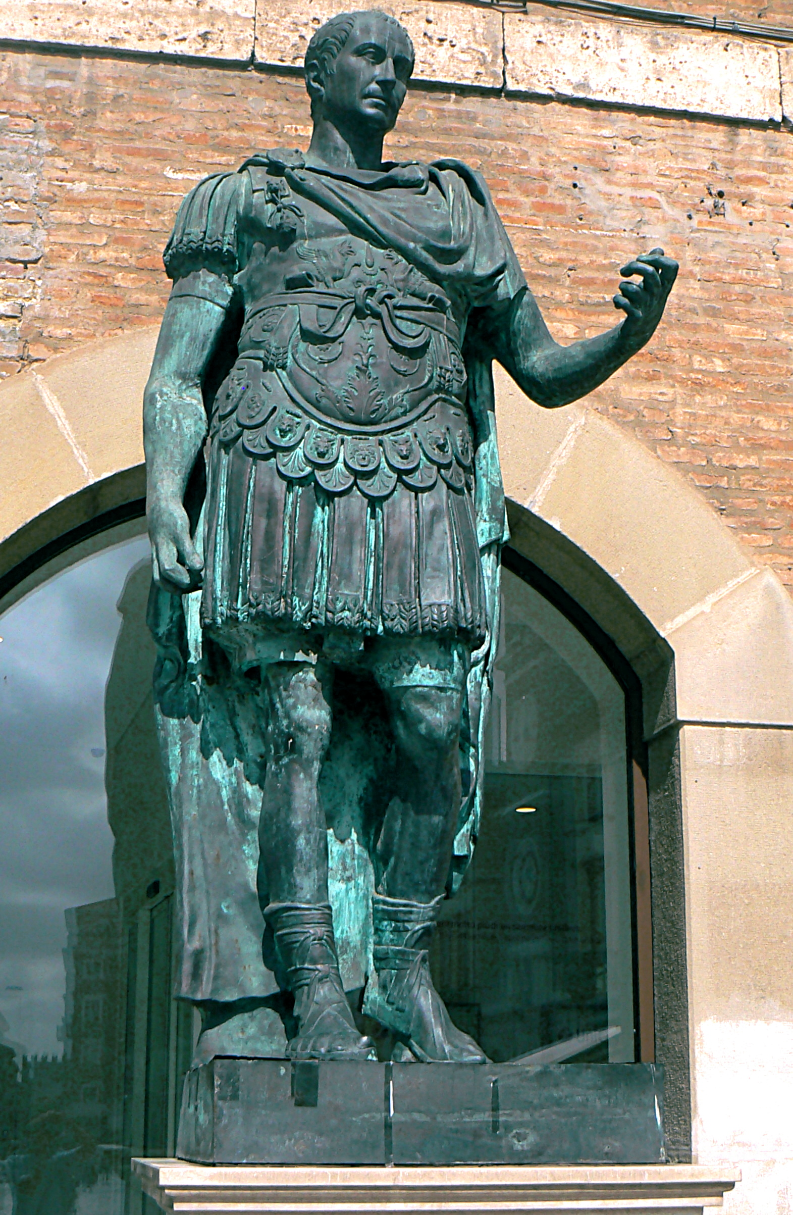 Statua di Giulio Cesare, Rimini, Italia This is a photo of a monument which is part of cultural heritage of Italy.